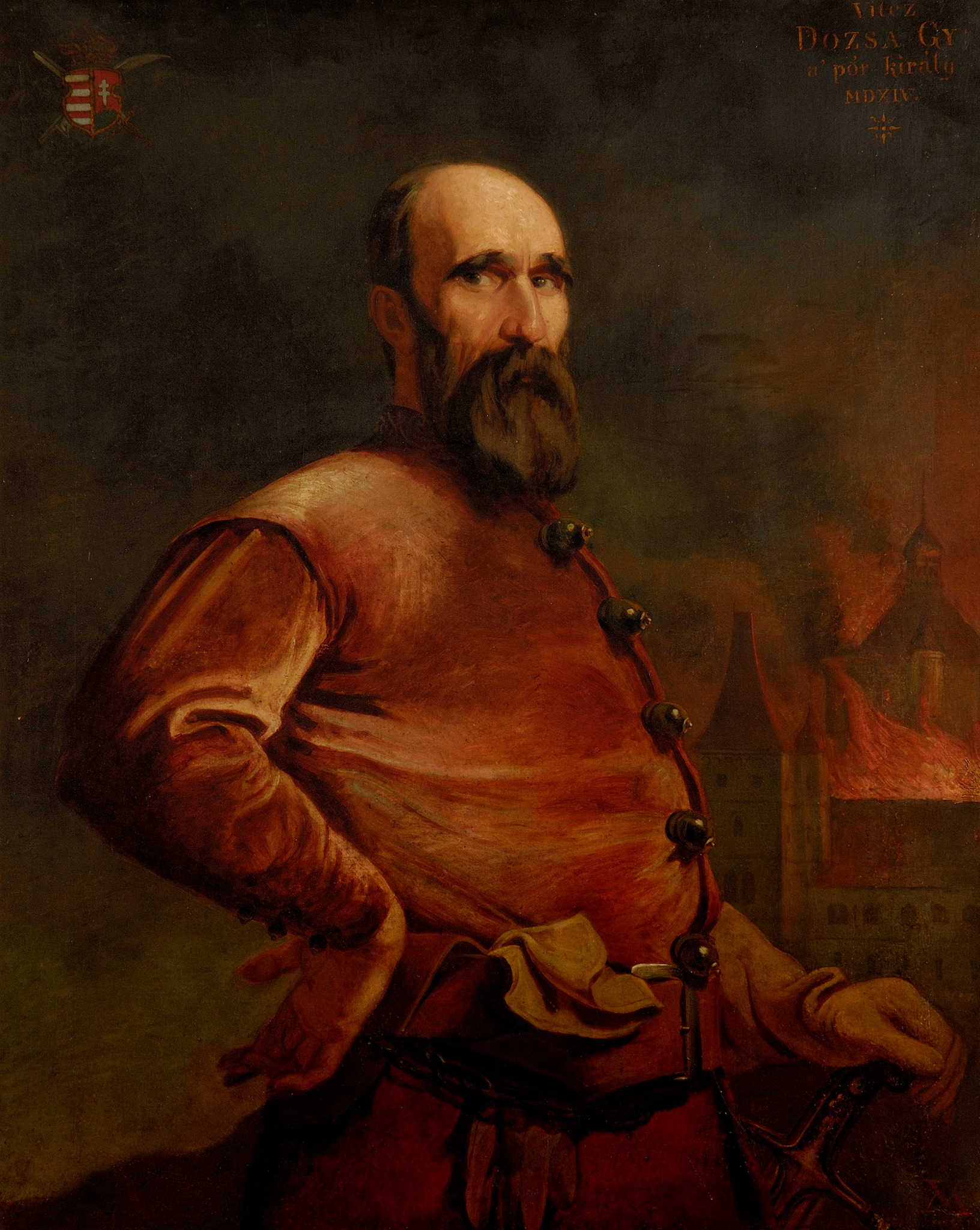 . (Madarász V. olajfestménye a Délmagyarországi Történeti és Régészeti Múzeum-Társulat Temesvári múzeumában. A Szépművészeti Múzeum 2542. lelt. számú letéte. Róna temesvári fényképész fényképe